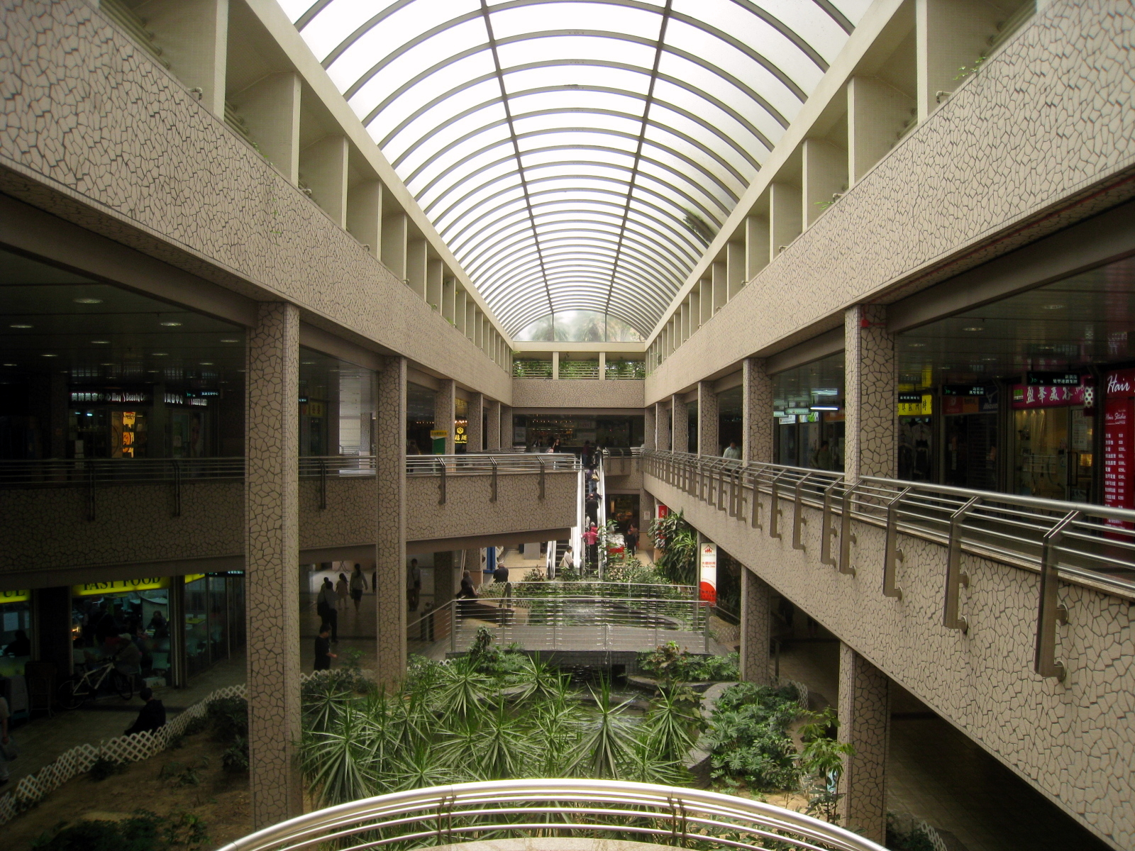 Sun Chui Estate Shopping Arcade 新翠商場